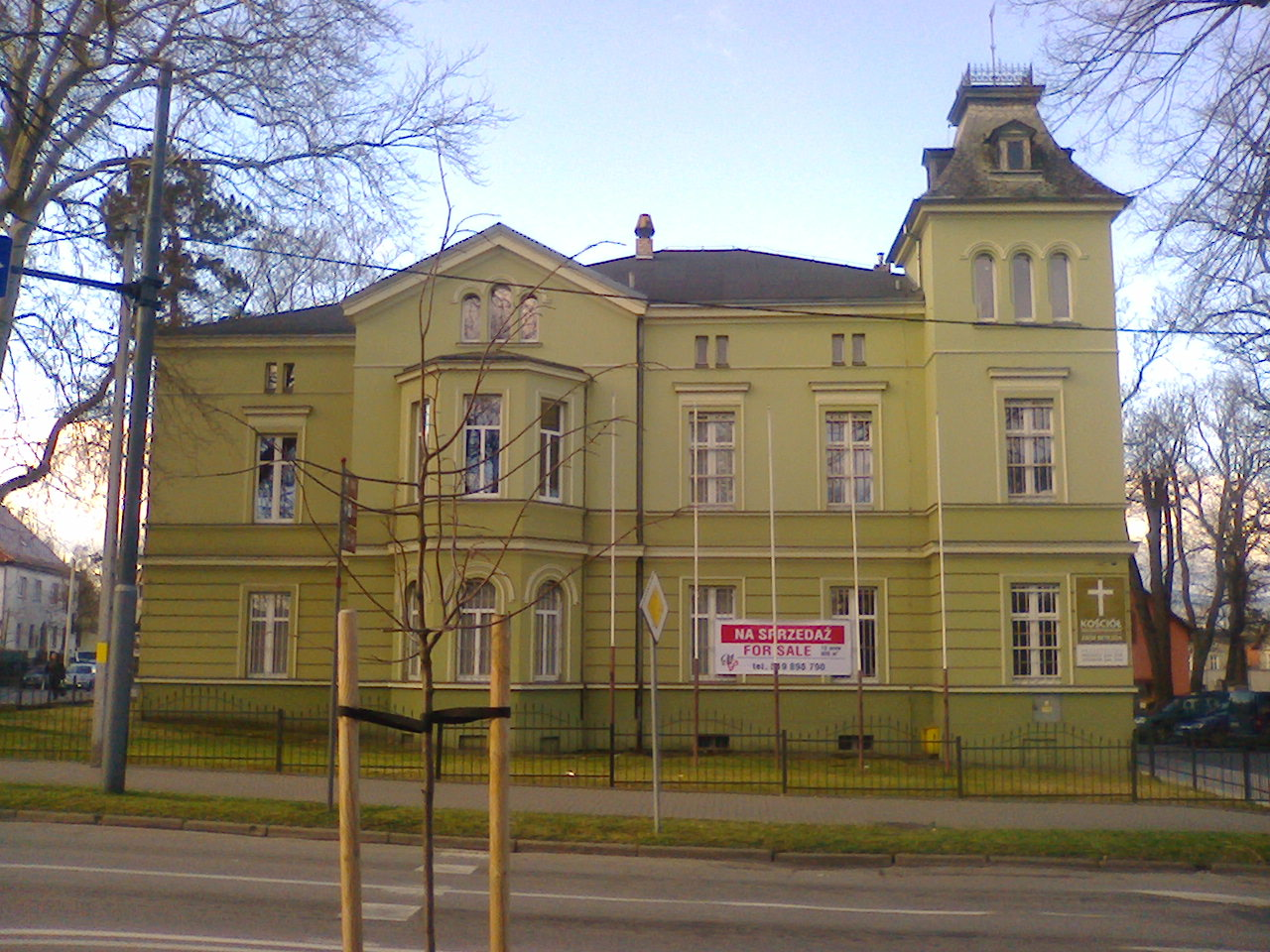 Dzierżoniów, ul. Świdnicka